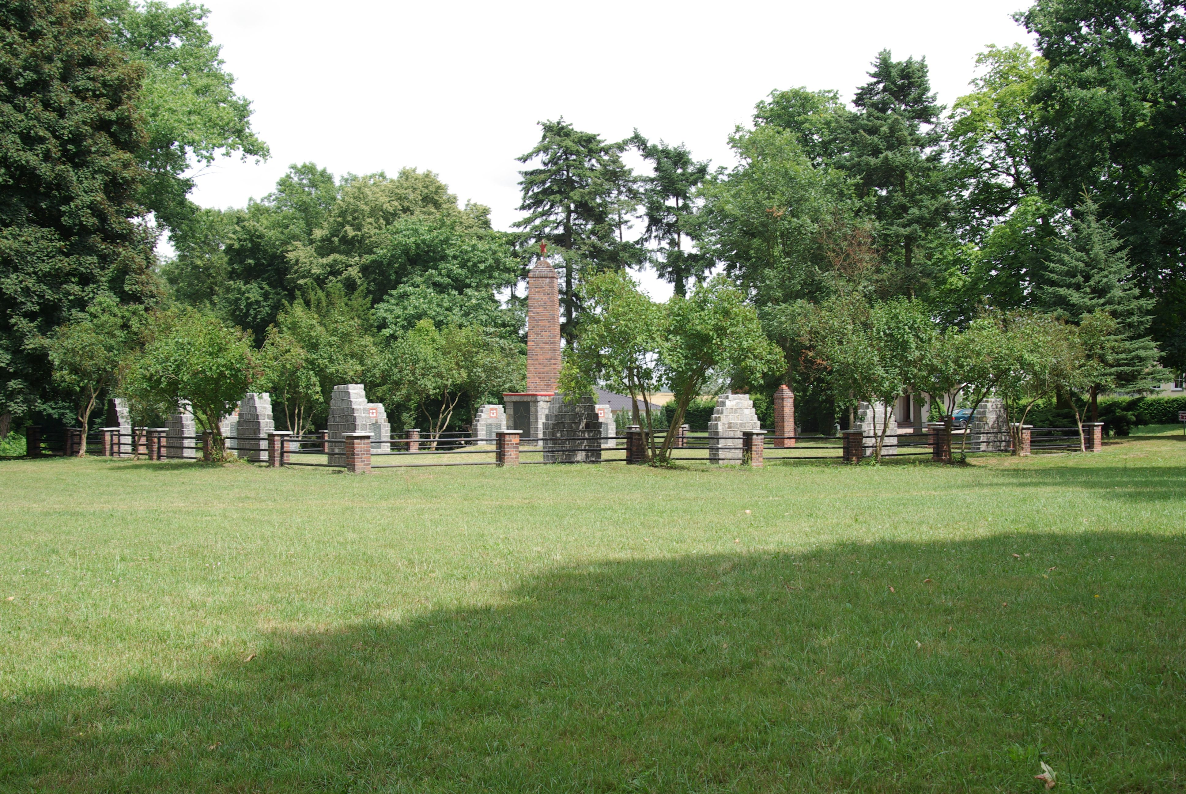 Steinhöfel, Ortsteil Heinersdorf, Landkreis Oder-Spree, Brandenburg, Deutschland, das Kriegerdenkmal am Dorfanger